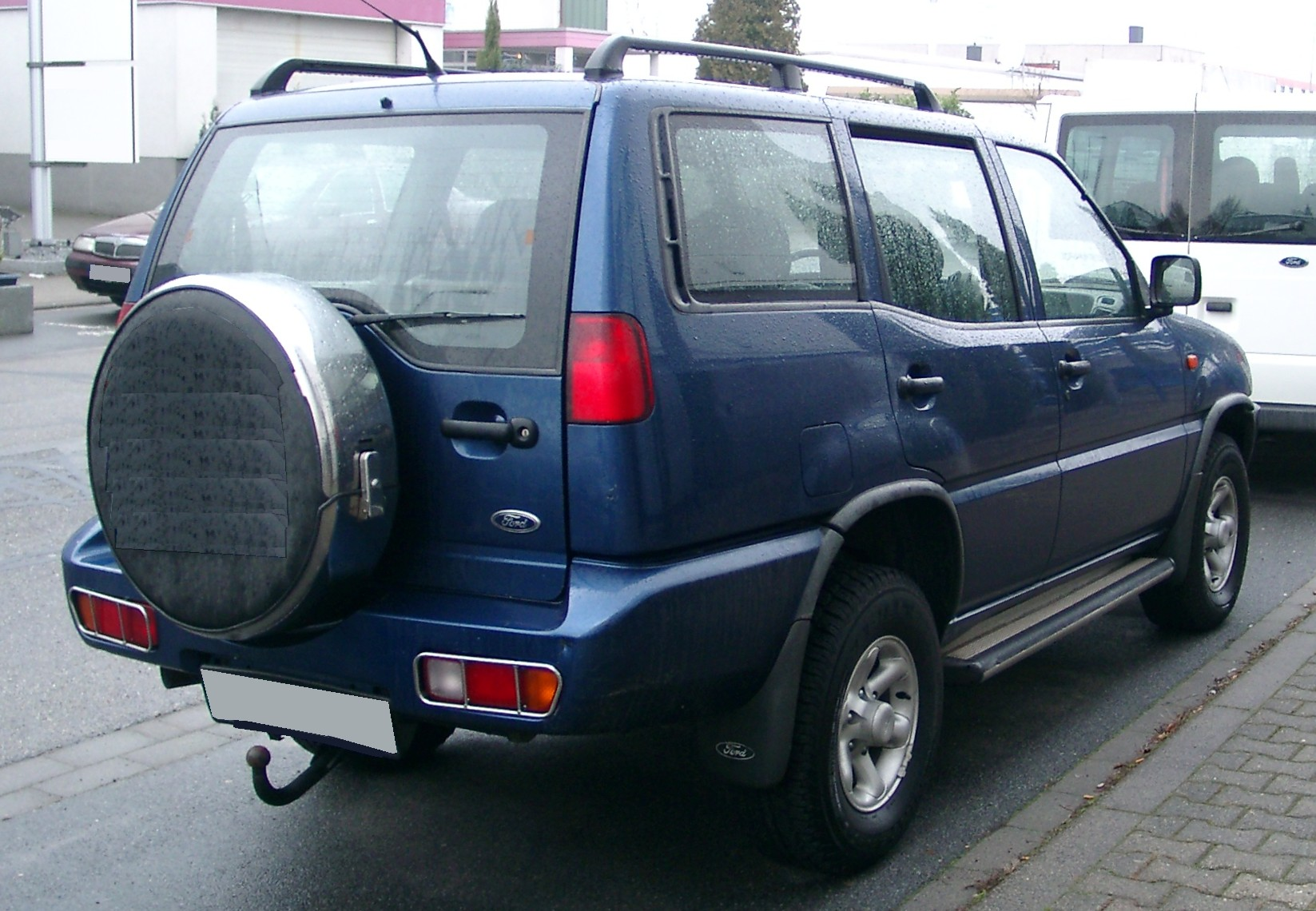 Ford Maverick (Europa)